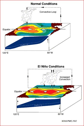 সাধারন অবস্থা এবং এল নিনো অবস্থা